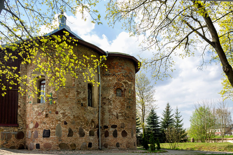 Гродна. Каложа